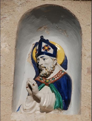 San Facondino busto fuori della chiesa